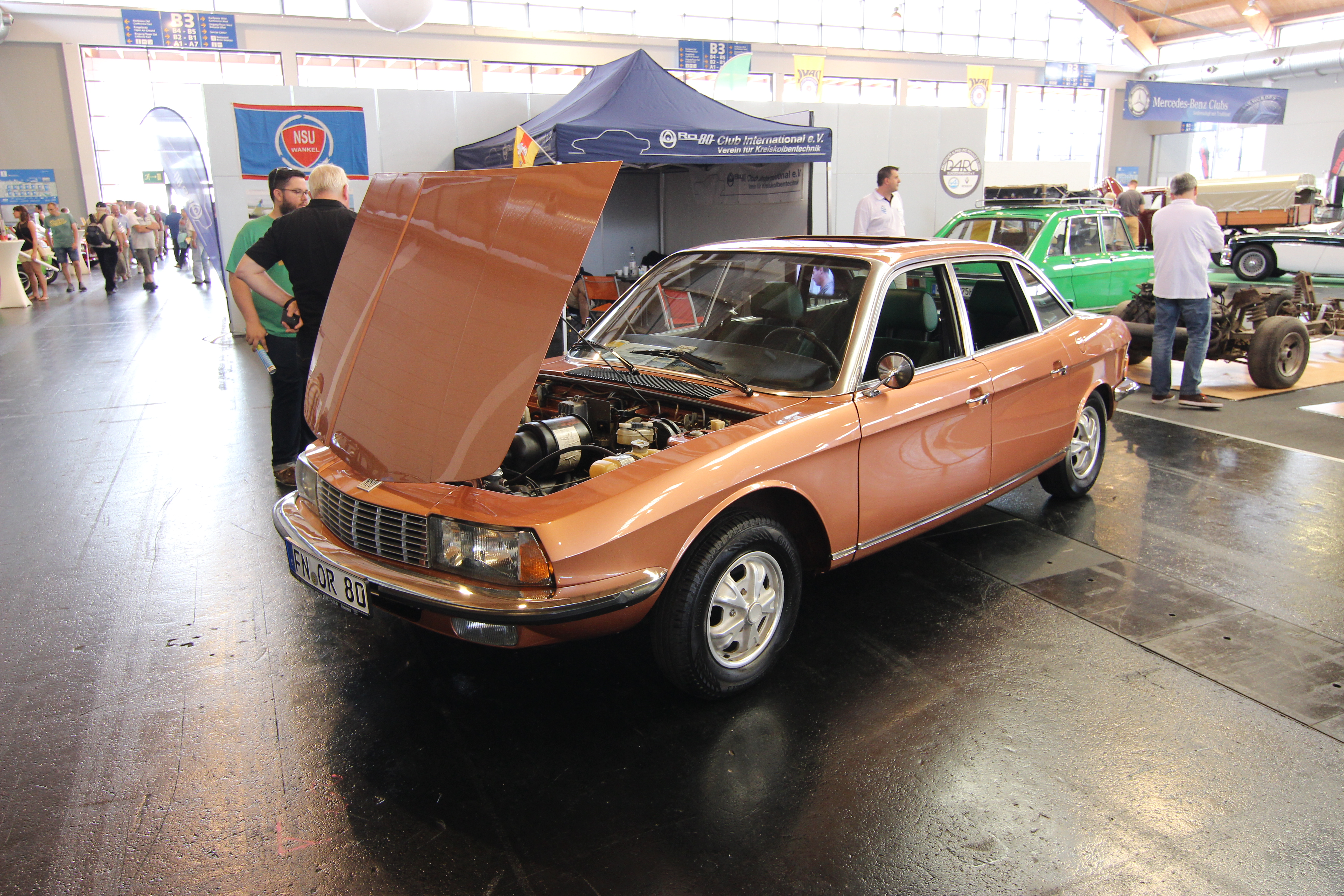 NSU Ro80 - auf der Klassikwelt Bodensee Friedrichshafen